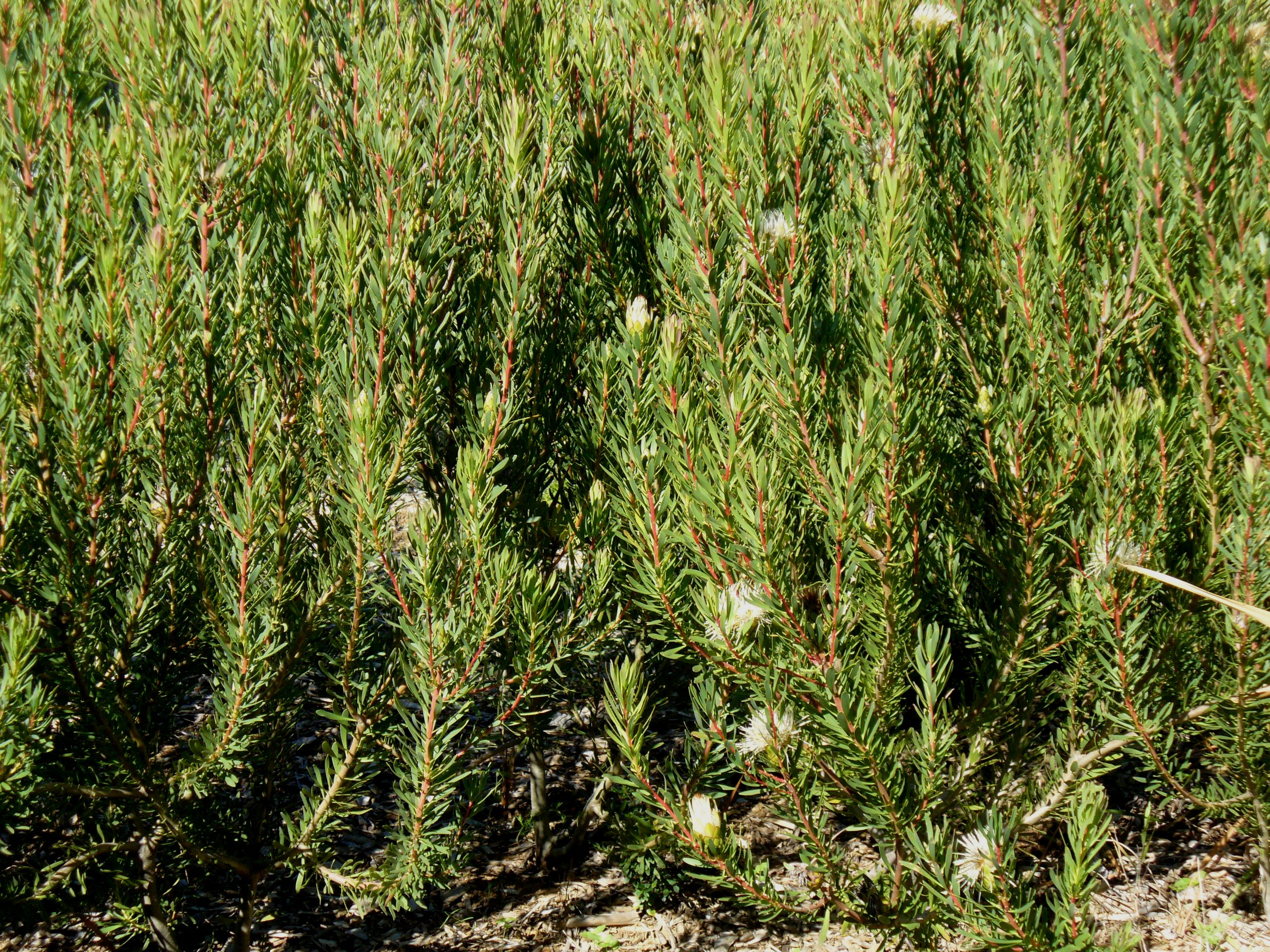 Kirstenbosch Gardens Cape Town